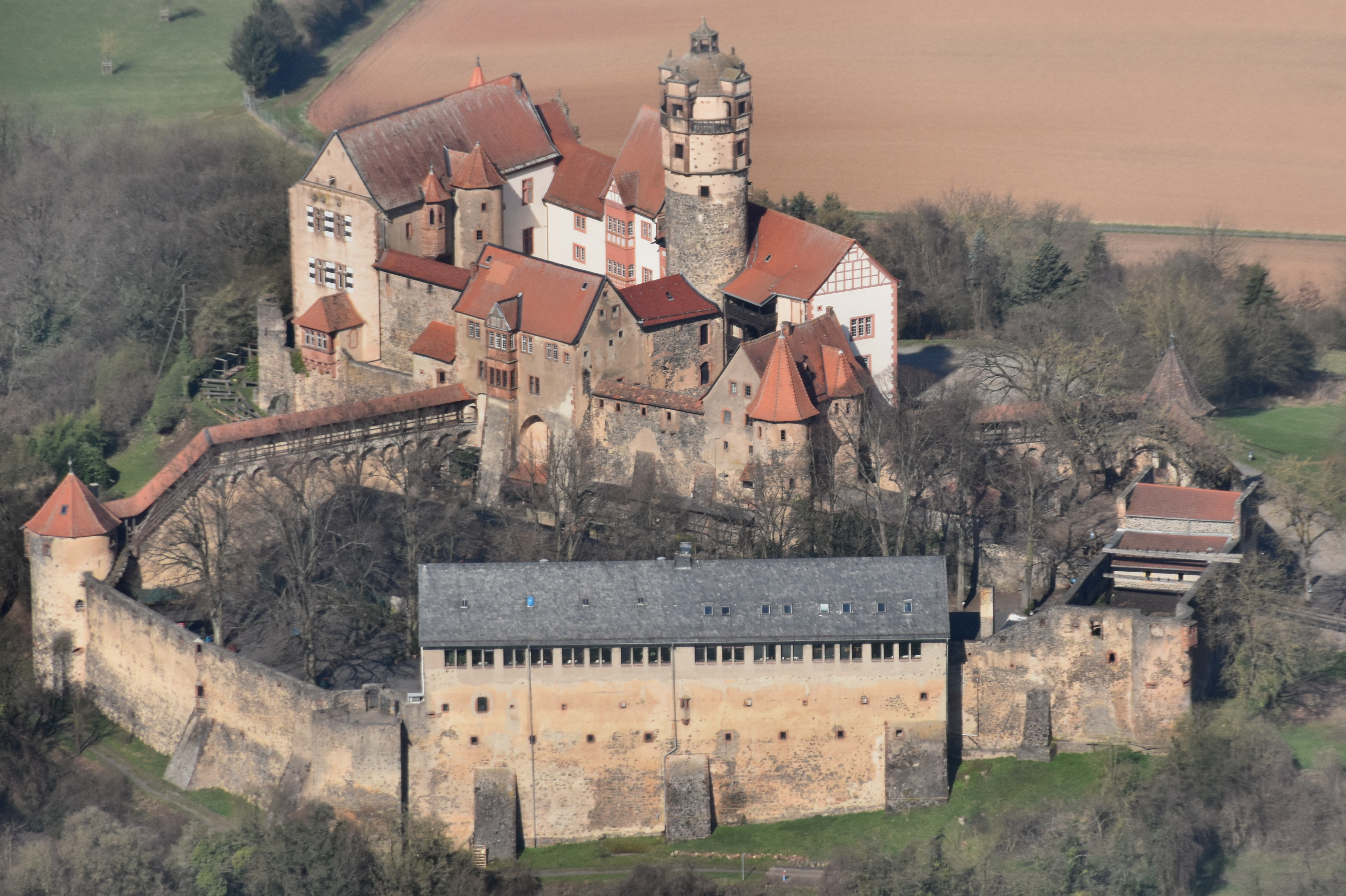 Luftbild der Ronneburg